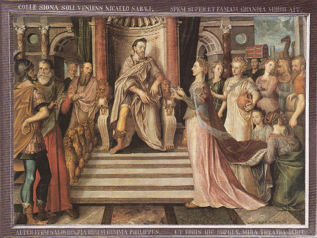 El texto del marco reza: "COLLE SIONA SOLI VENIENS NICAULO SABÆI, SPEM SUPER ET FAMAM GRANDIA MIROR AIT," (arriba) y "ALTER ITEM SALOMON, PIA REGUM GEMMA PHILIPPUS, UT FORIS HIC SOPHIÆ MIRA THEATRA DEDIT" (abajo). La traducción de este texto, tomado de II Crón 9:5, dice: "Llegando desde la colina Nicaulo, en la tierra de Saba, hasta Sión [Jerusalén], ella [la Reina de Saba] dijo: «He visto cosas mucho mayores de lo que esperaba y me habían contado». Del mismo modo otro Salomón, Felipe piadosa joya entre los reyes, dio aquí como fuera asombrosas escenas de sabiduría.".